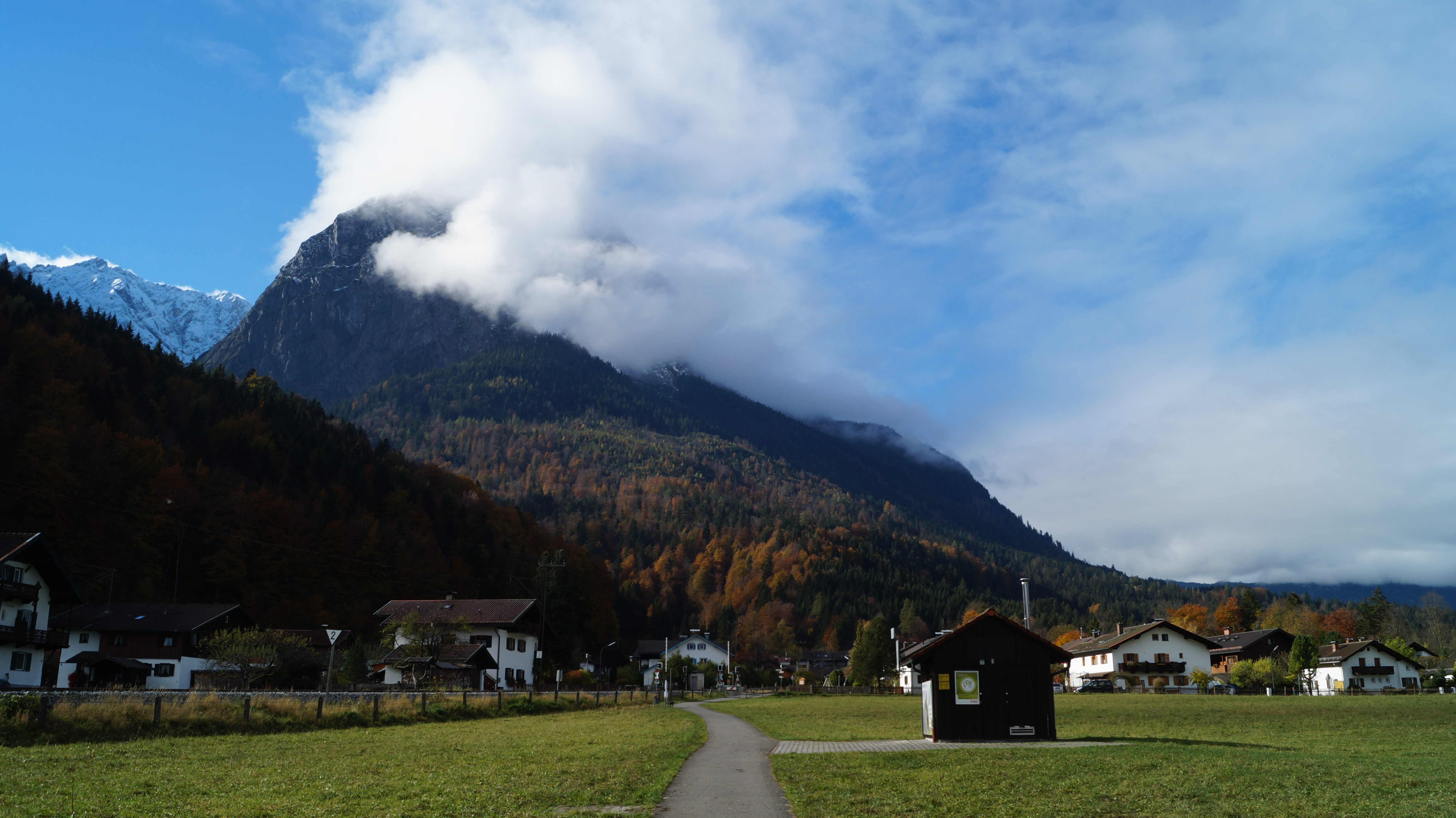 Blick auf Hammersbach mit dem Gleis der Zugspitzbahn und dem Waxenstein im Hintergrund von Nordost.